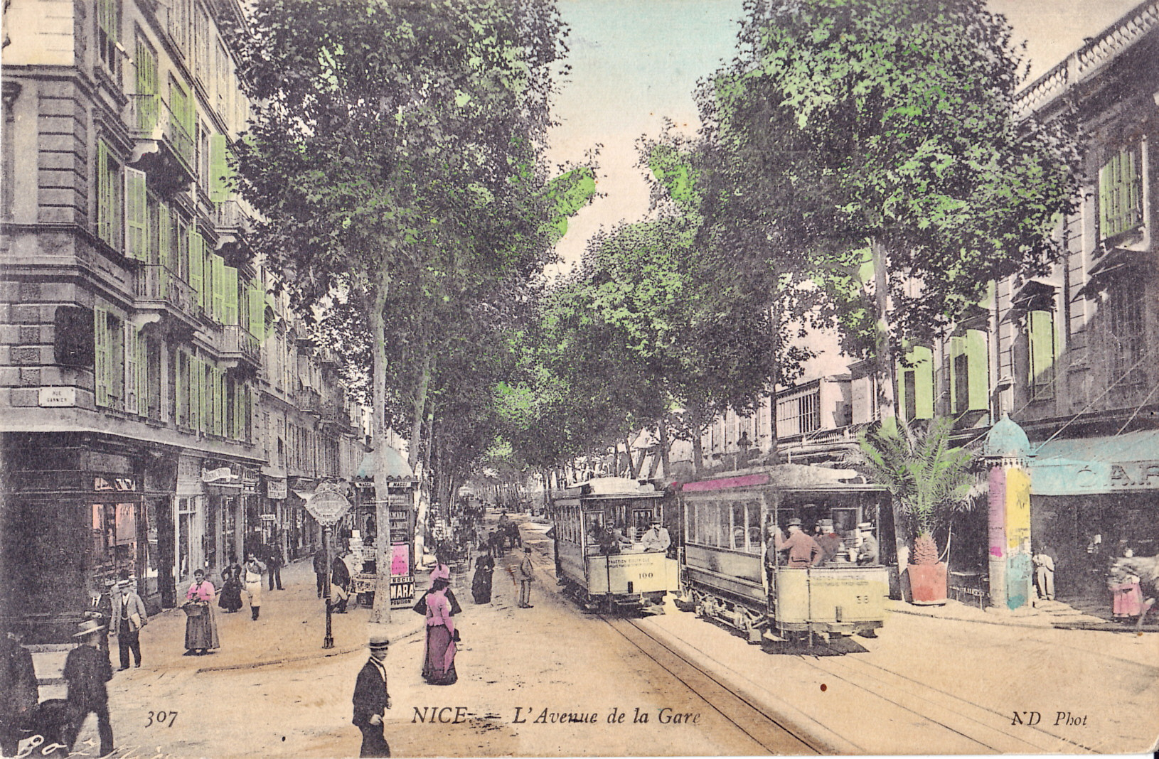 Carte postale ancienne éditée par ND, n°307 : NICE - L'Avenue de la Gare